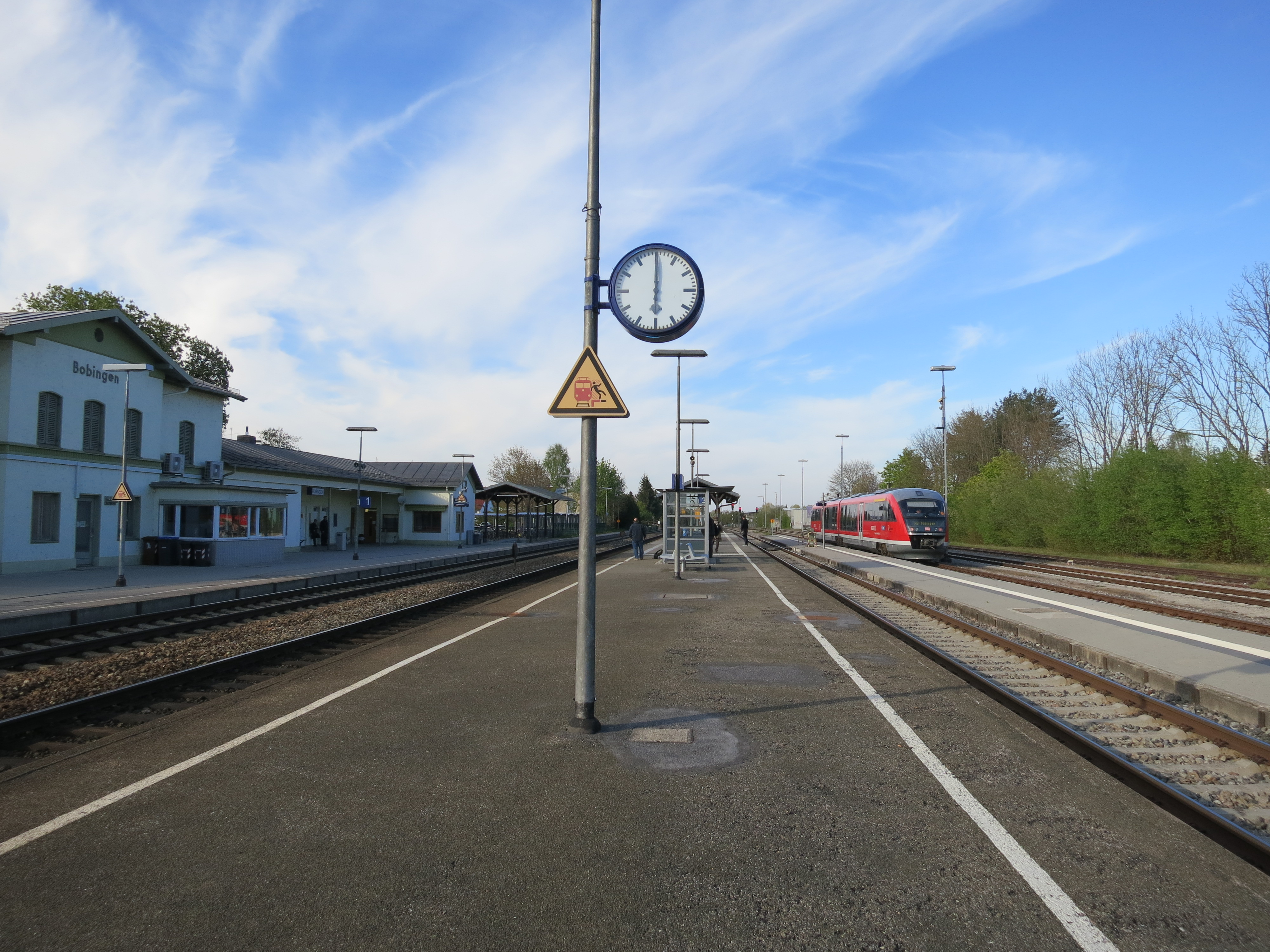 Bahnsteige des Bahnhofs Bobingen mit Dieseltriebwagen der Baureihe 642 und Gleisseite des Empfangsgebäudes